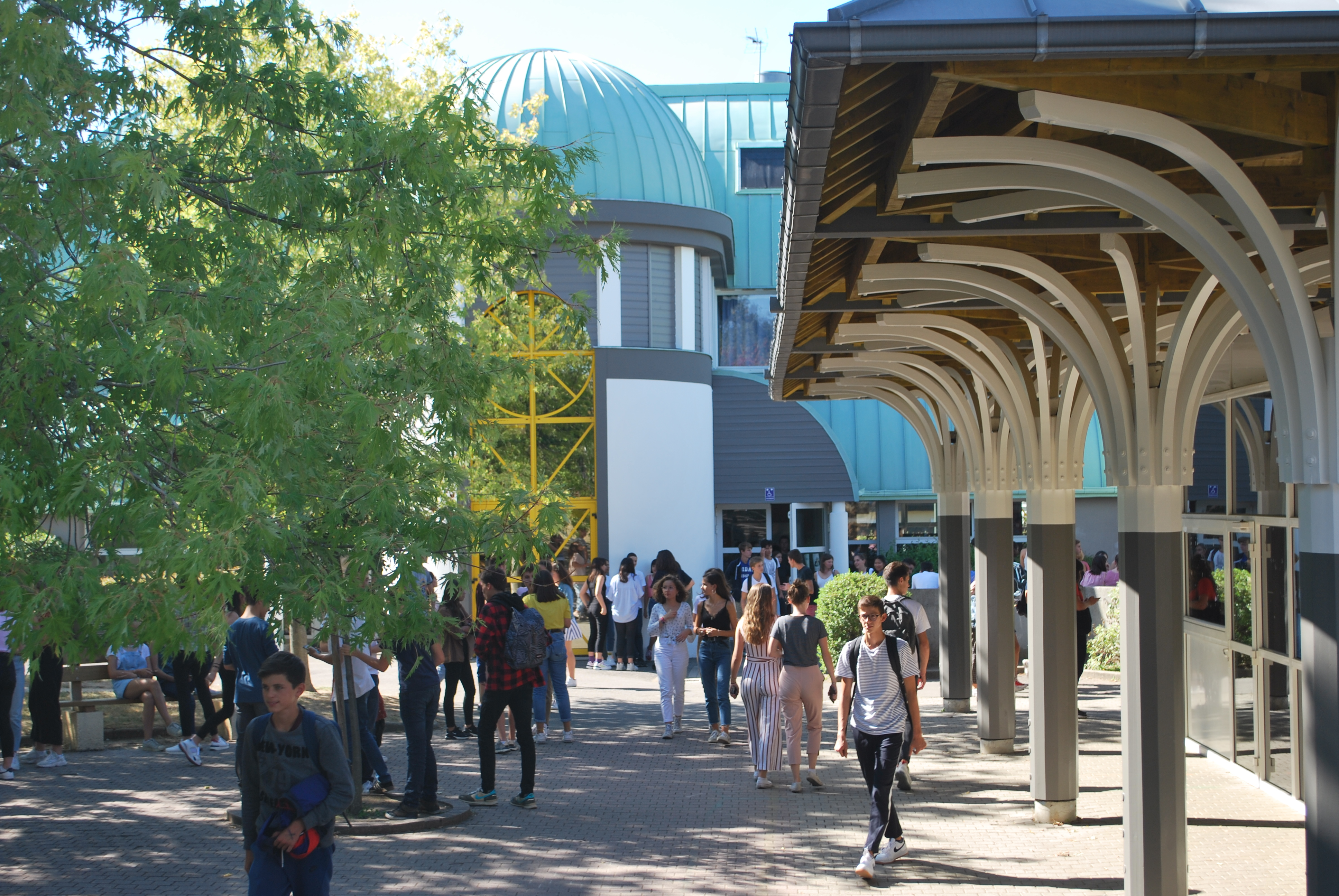 Lycée Notre-Dame de Toutes Aides à Nantes, France - Photographie de l'Enchanterie, lieu qui accueille les lycéens et la restauration scolaire.